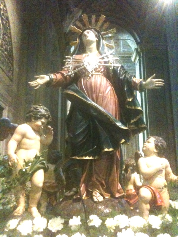 Statua lignea raffigurante L'Addolorata, opera di Filippo Martinengo, fine Settecento, Savona (Italy)